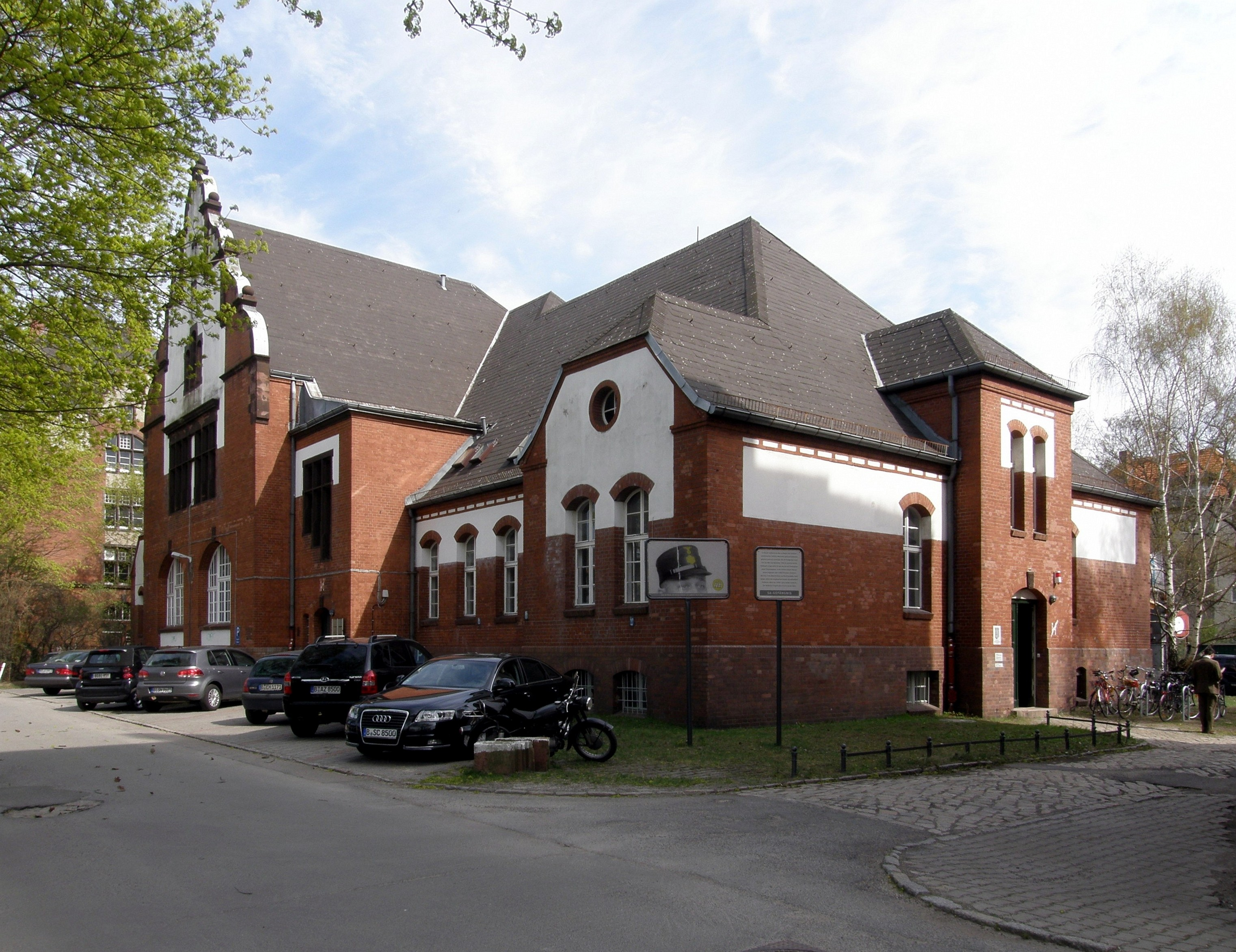 Gebäude Werner-Voss-Damm 54a in Berlin-Tempelhof, Teil der ehemaligen Eisenbahnerkasernen Papestraße. Hier war in den Kellerräumen von März bis Dezember 1933 das Gefängnis der SA-Feldpolizei untergebracht.